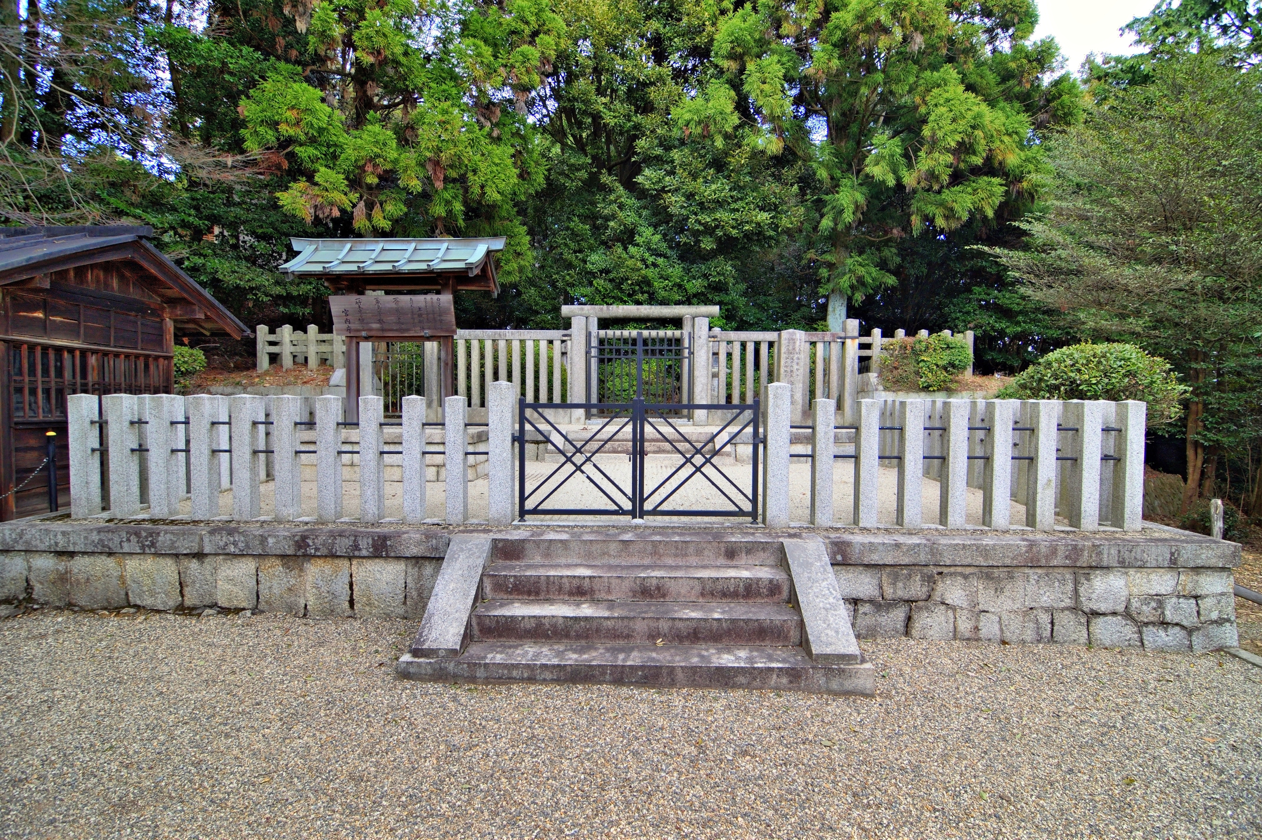 醍醐寺上醍醐 白川皇后陵